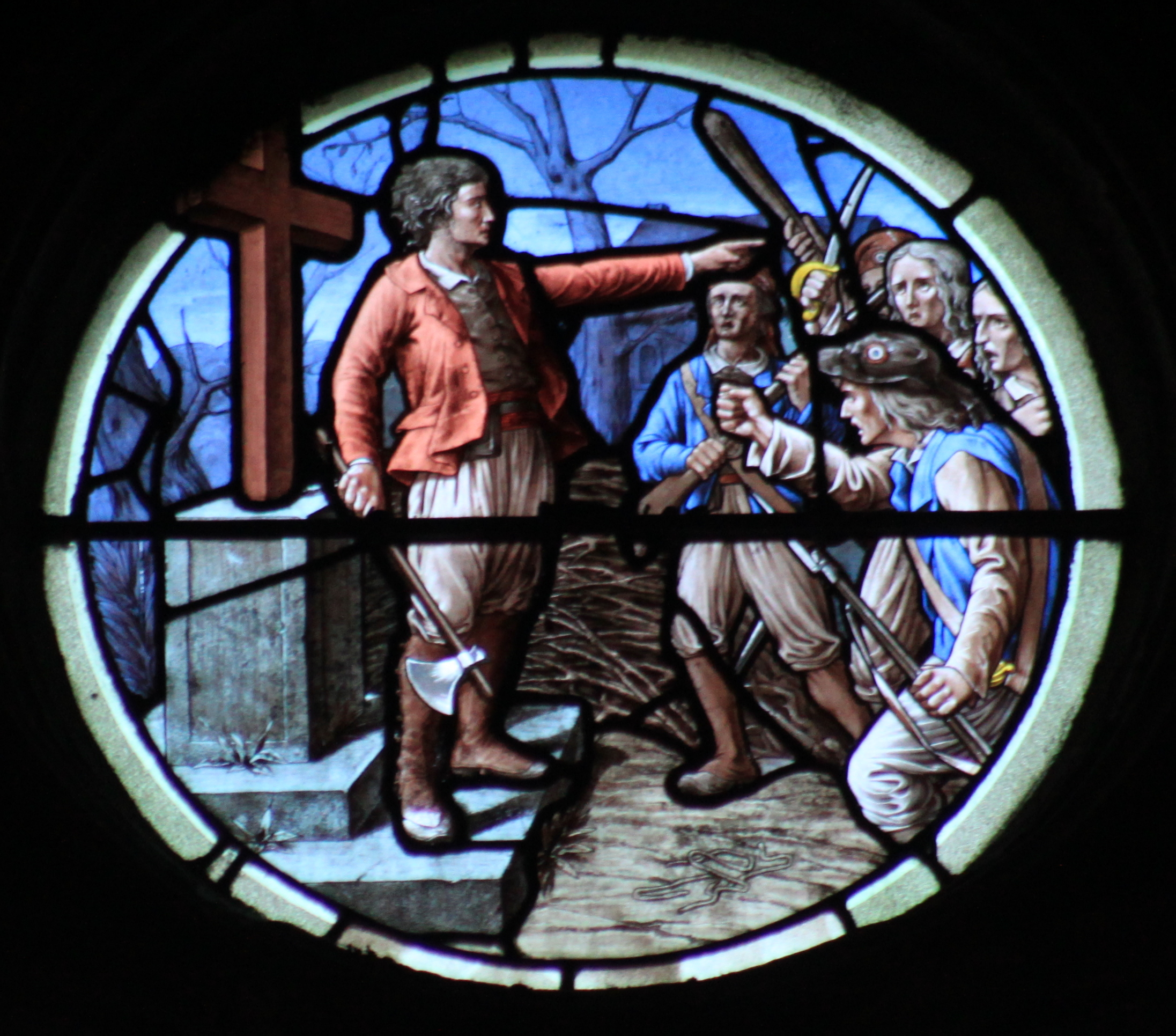 Vitrail commémoratif d'André Ripoche, église Immaculée Conception, Fr-44-Le Landreau.